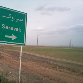 تابلو راهنمایی ورودی